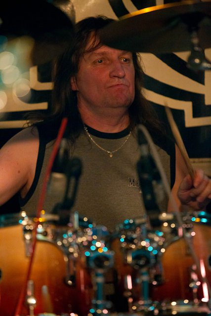 Aleš Zimolka při vystoupení v žižkovském klubu Kain.